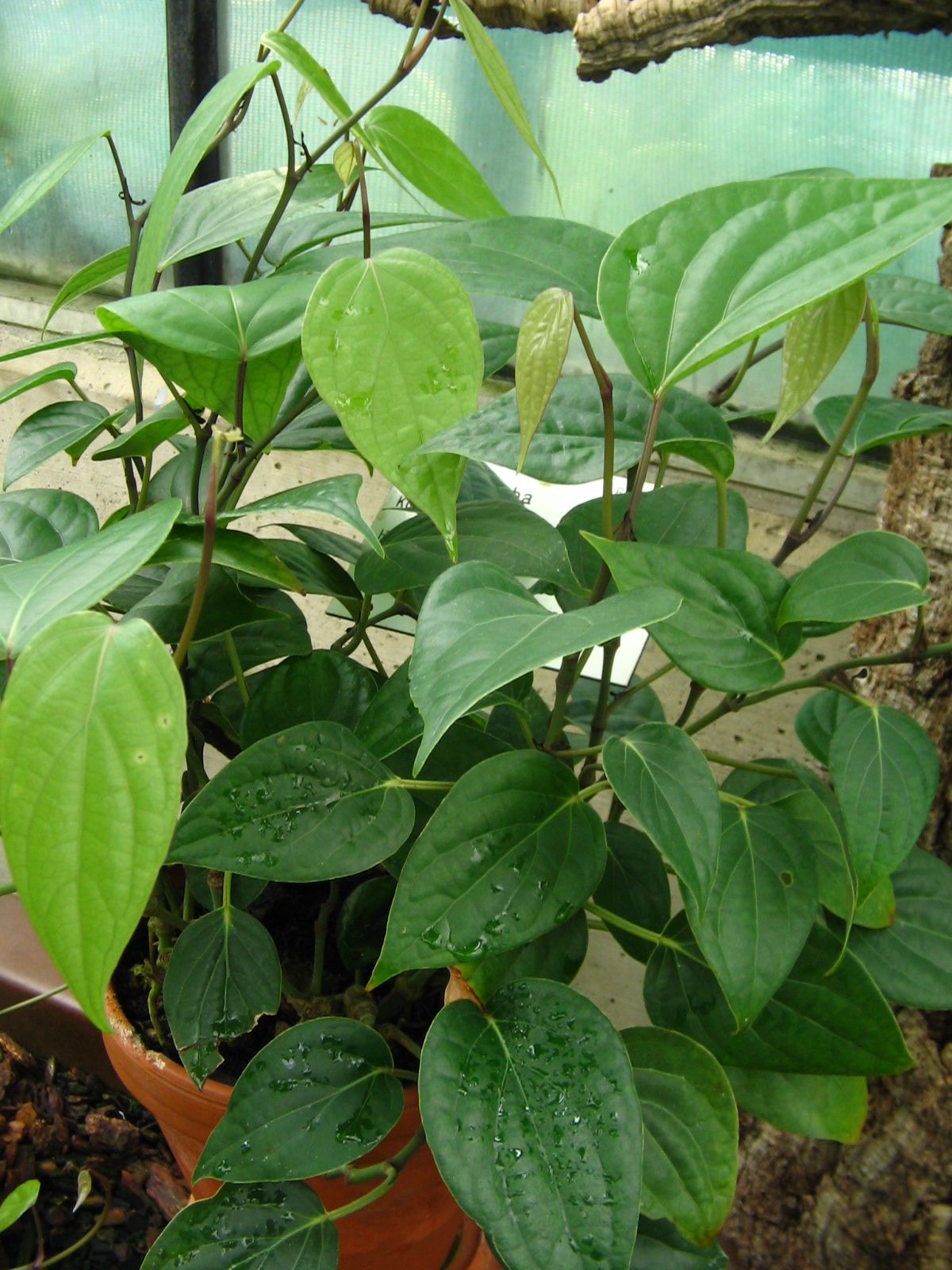 Kemukus (Piper cubeba) still young